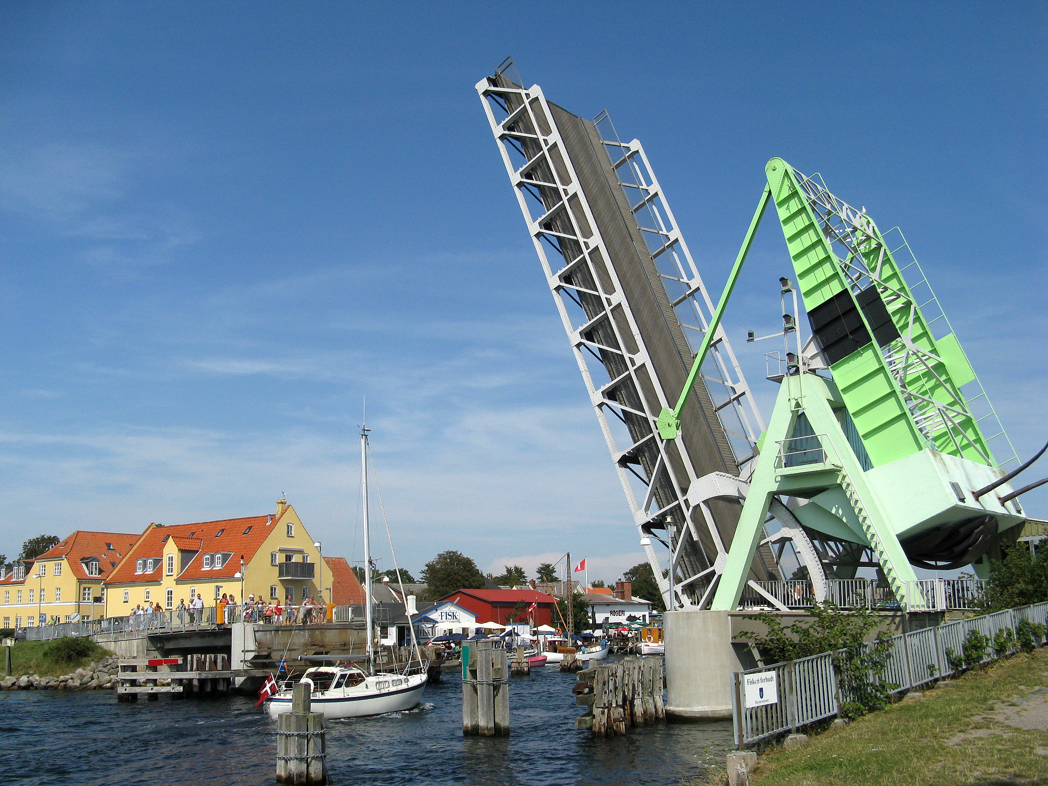 Græshoppebroen i Karebæksminde ved Næstved, på Sjælland i Denmark